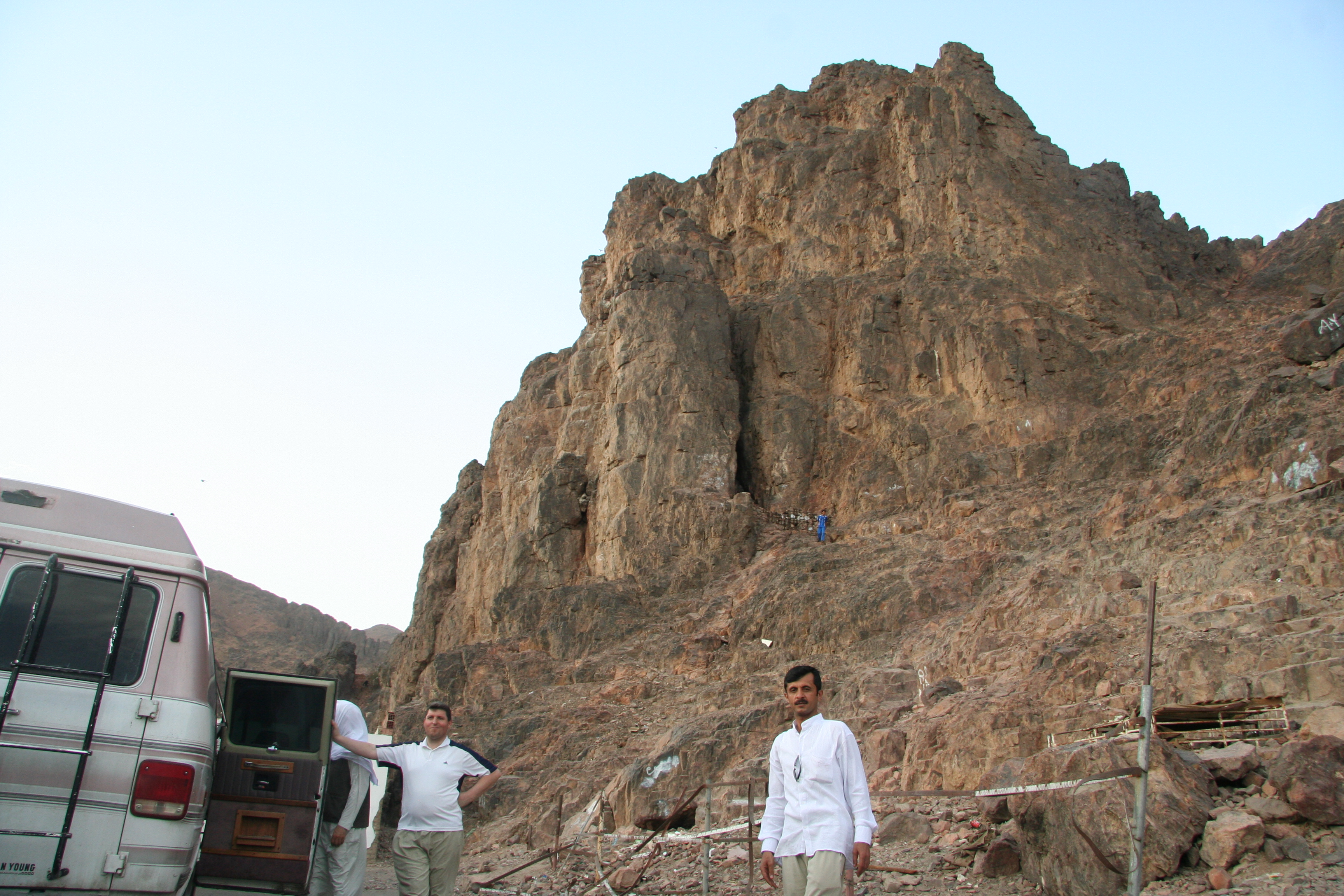 Al Andalus, Mecca Saudi Arabia